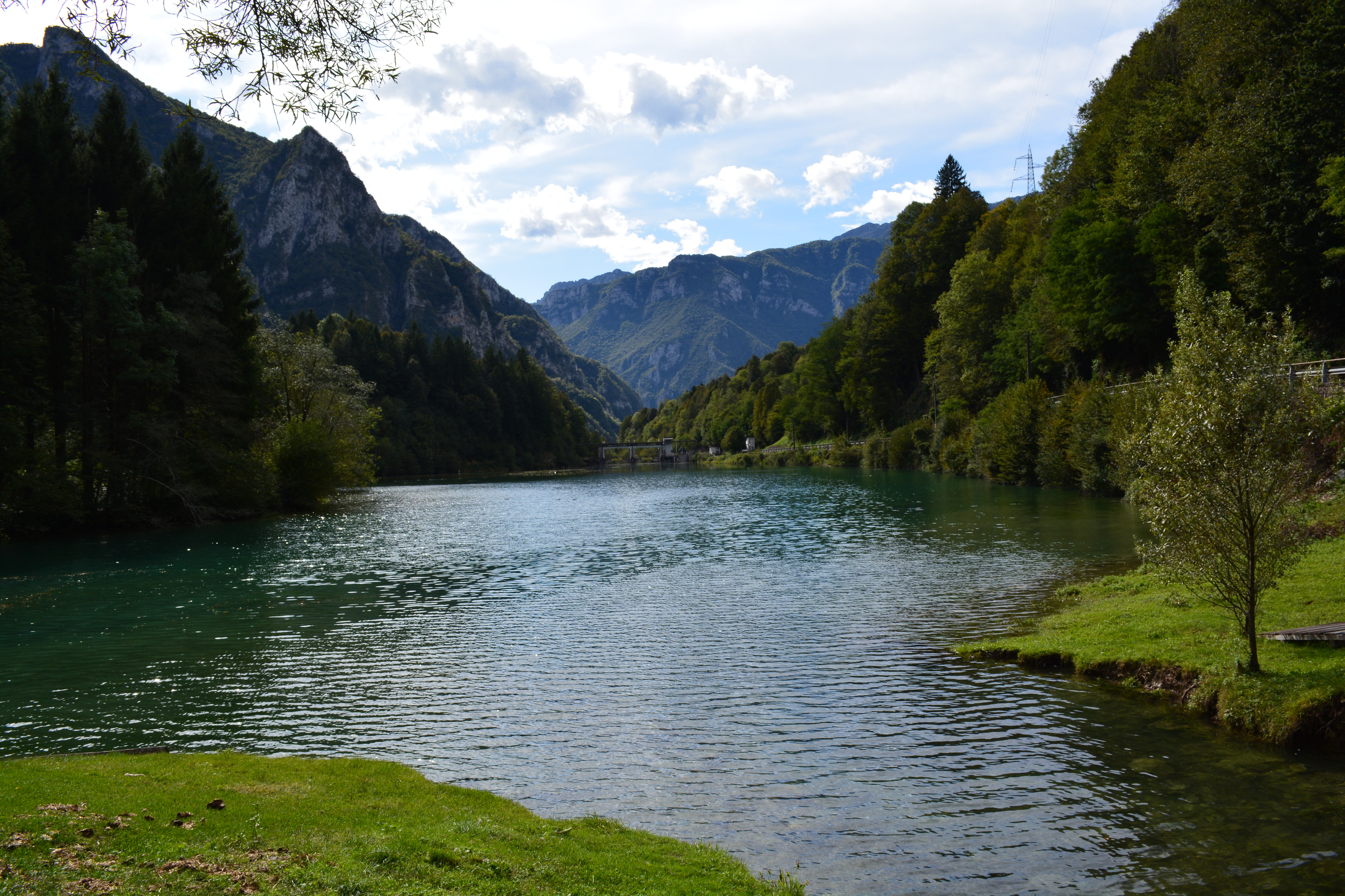 Lago de Bernigolo na província de Bérgamo. Foto de Siloé Mascolo.